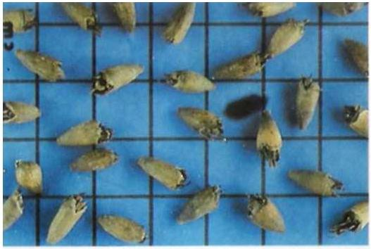 Foto genérica dos frutos secos da árvore de freijó (Cordia goeldiana)